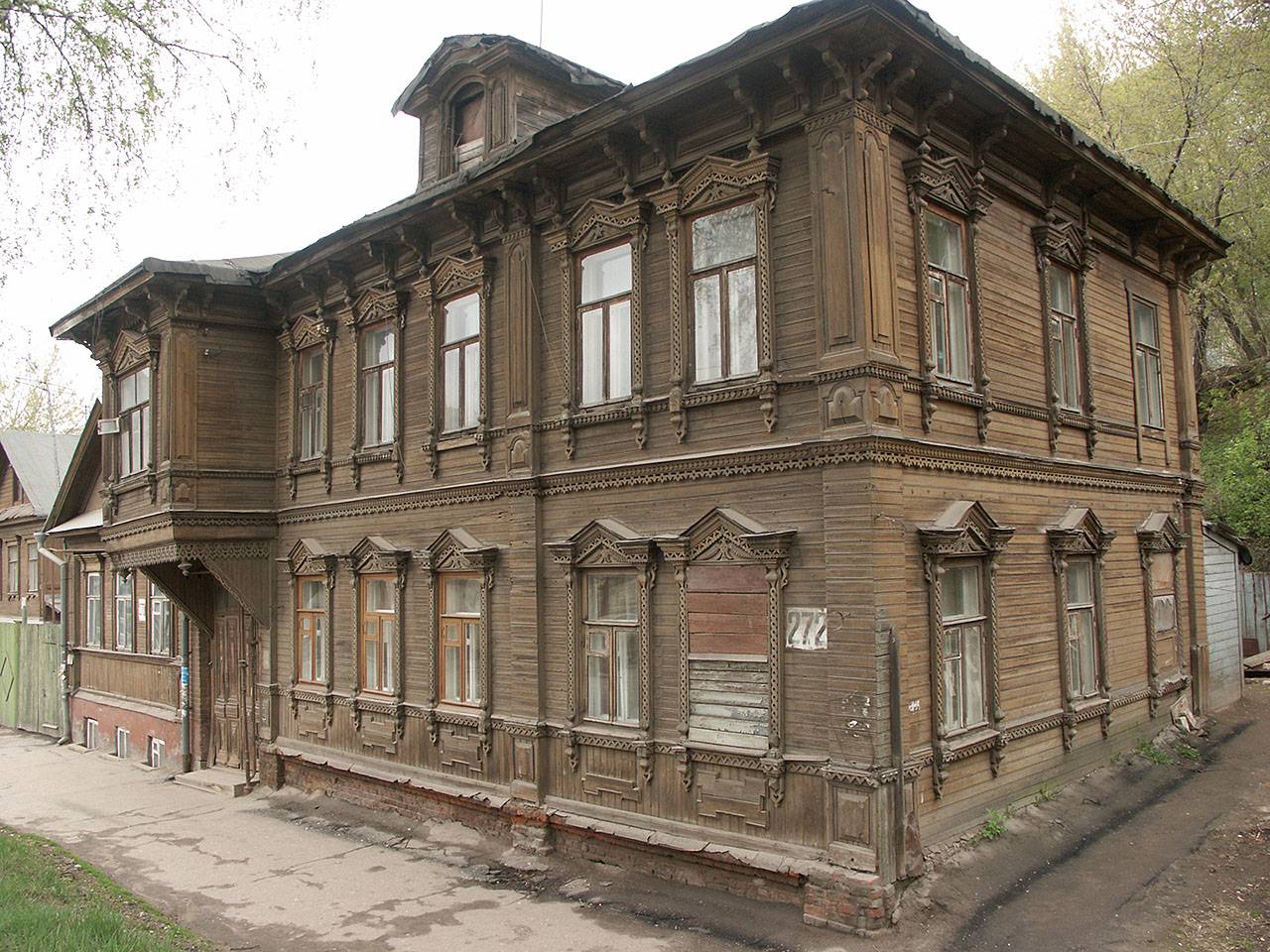 Россия: Нижний Новгород: Нижегородский район: ул.Максима Горького,272; 15:31 09.05.2006